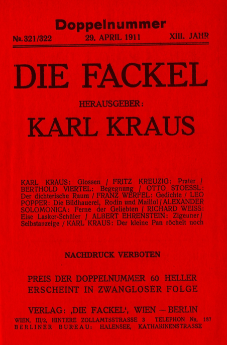 Deitsch: Bildschirmfoto 2018-11-04 um 08.41.23